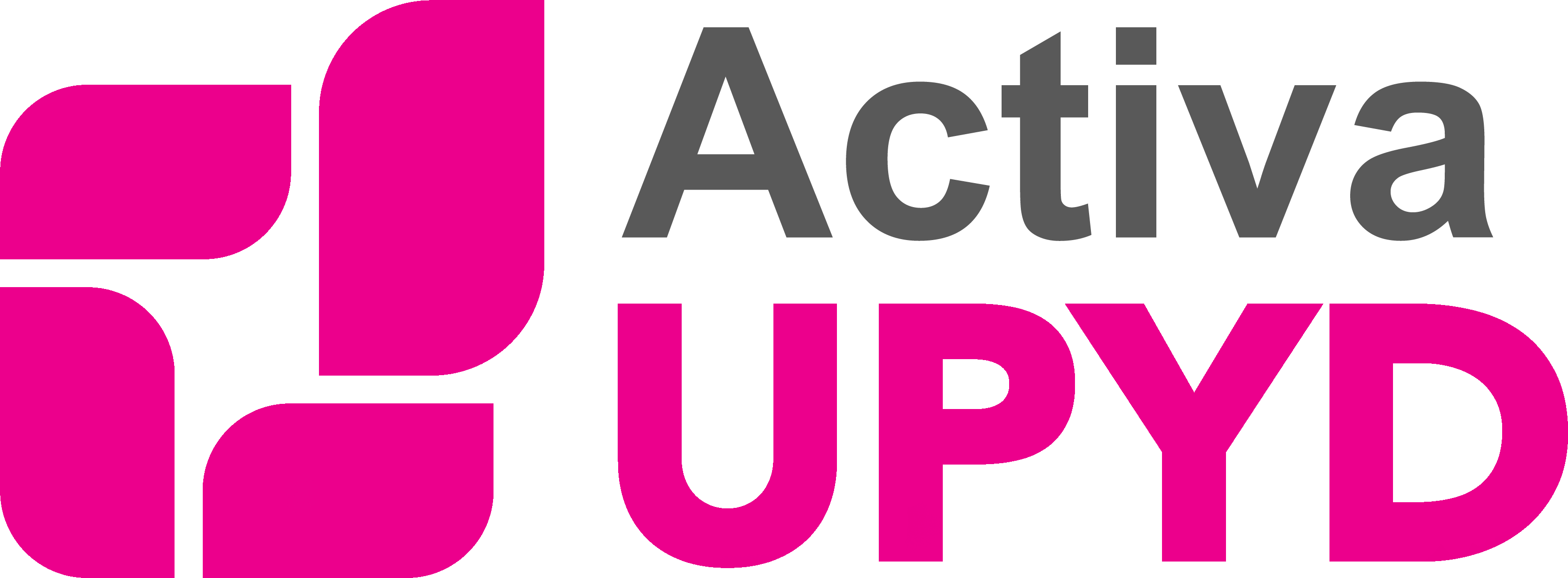 Logo campaña Activa UPYD